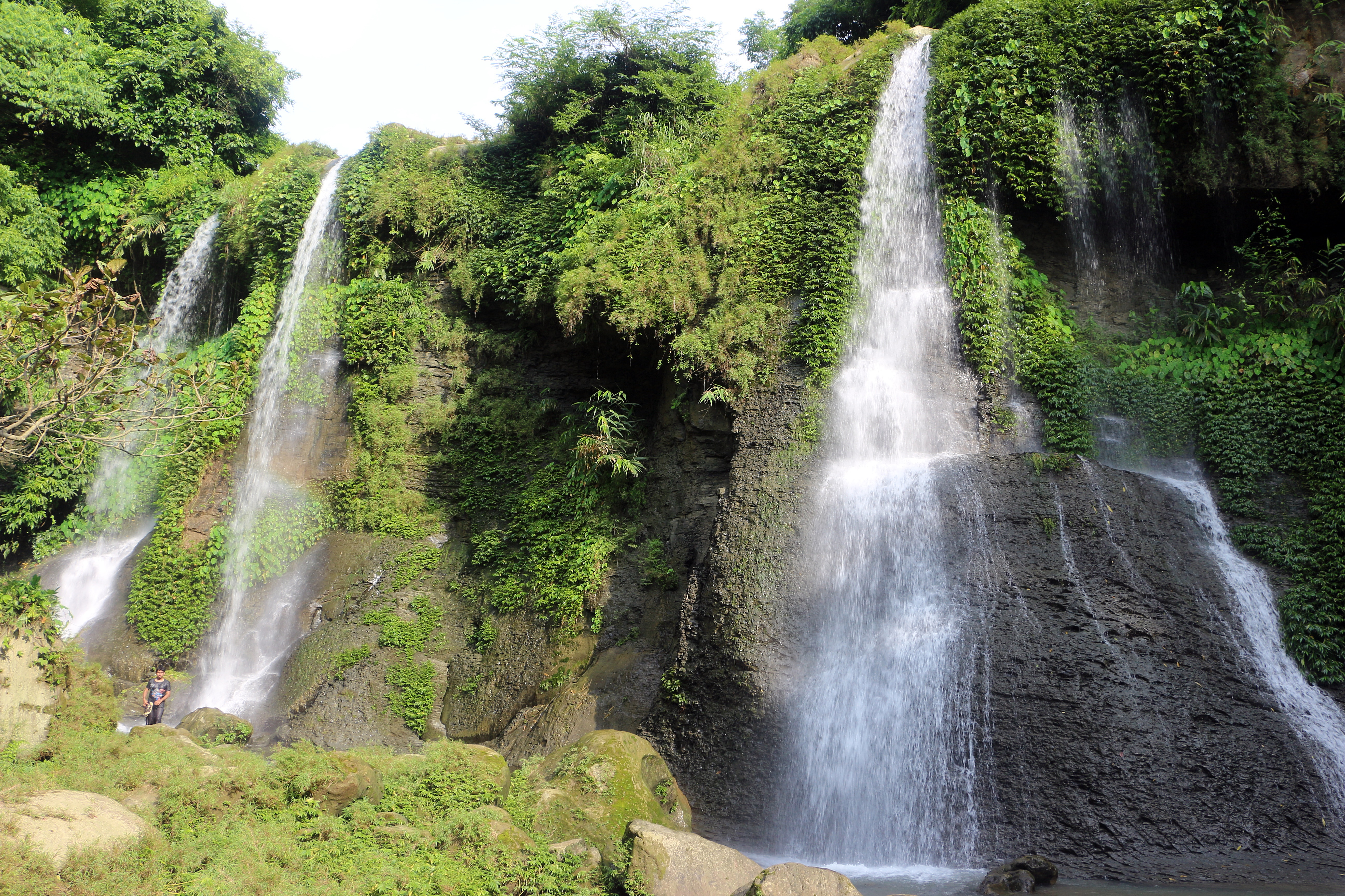 বোটানিক্যাল গার্ডেন ও ইকো-পার্ক, সীতাকুণ্ড